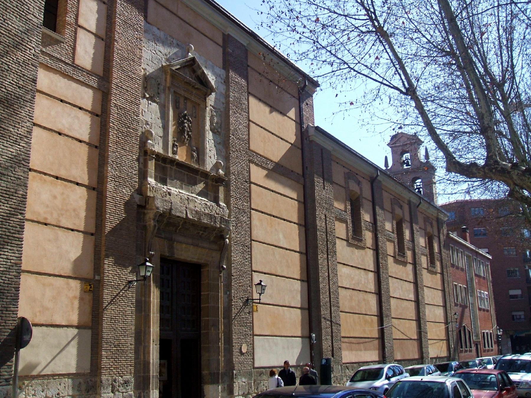 Monasterio de San Quirce y Santa Julita (MM Cistercienses), Valladolid (Castilla y León, España)